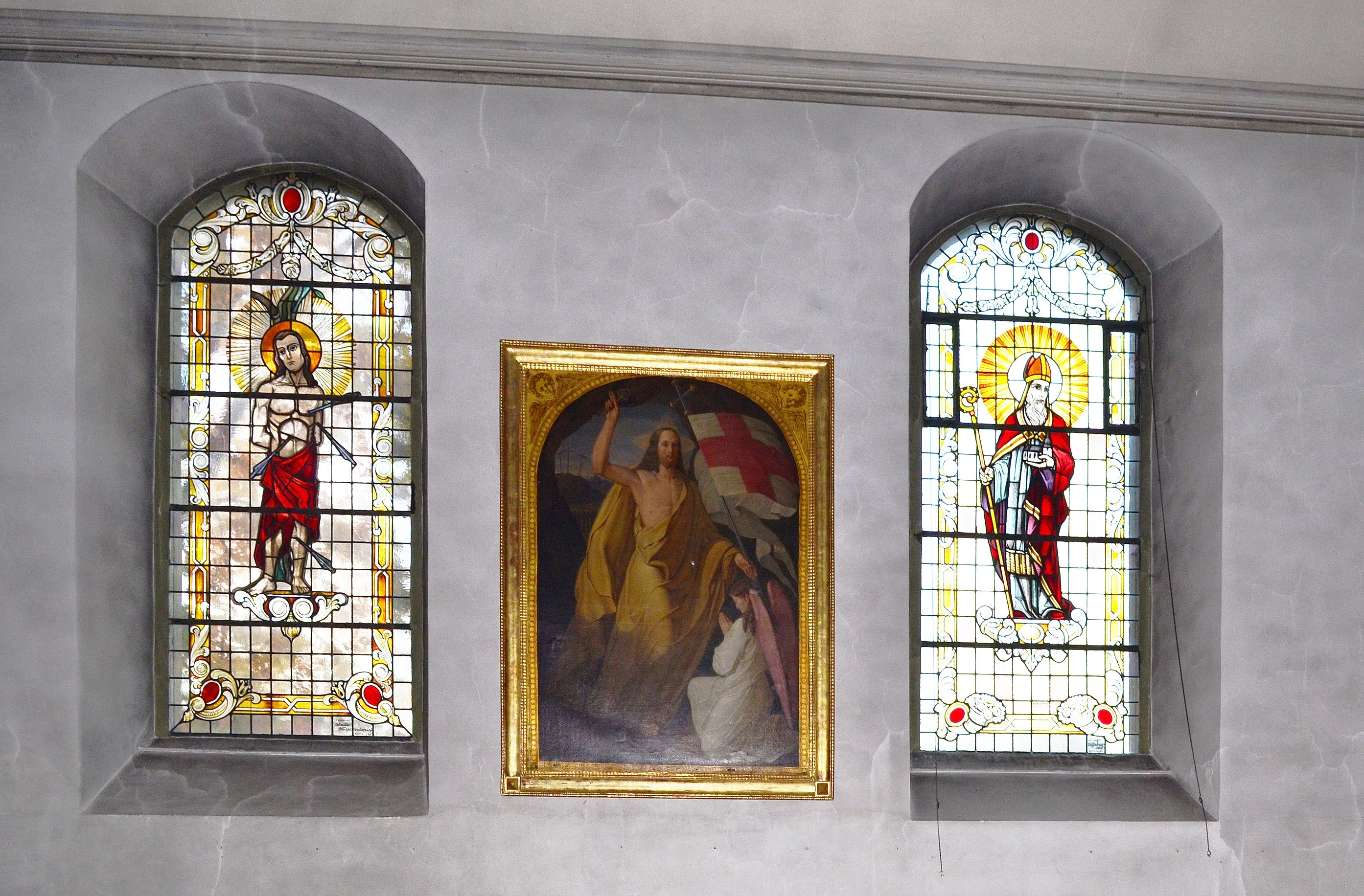 Alme, St. Ludgerus, Glasfenster und Gemälde